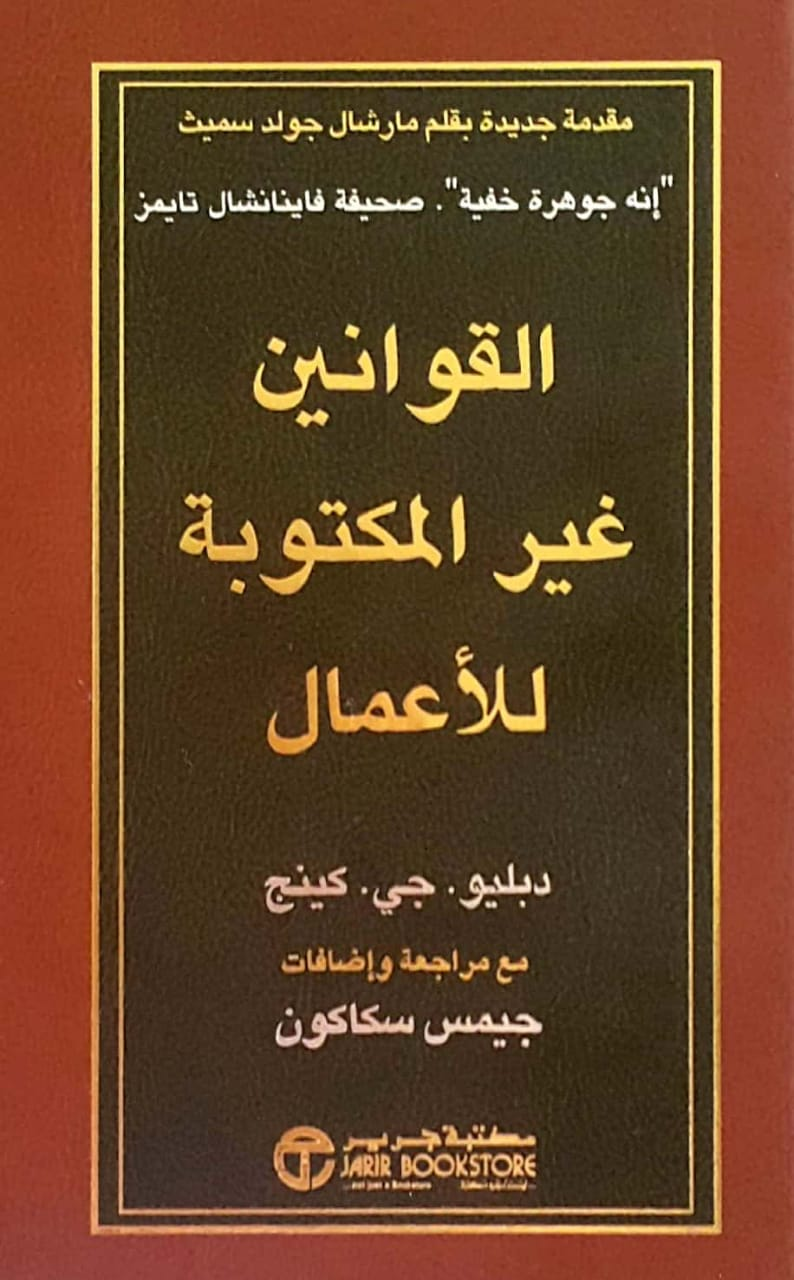 صورة غلاف الطبعة المترجمة لكتاب القوانين غير المكتوبة للأعمال